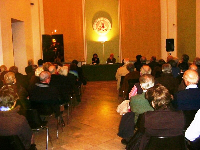 Cesare Viazzi Manifestazioni 150º anniversario della nascita. Accademia Ligustica Genova 15 febb 2008.